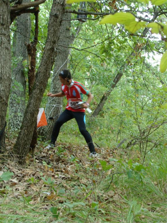 Състезател по радиозасичане регистриращ се в четящото устройство на предавател по време на състезание. Снимката е направена при провеждането на Европейско първенсто 2009 г в България.